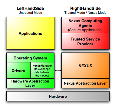 NGSCB diagram